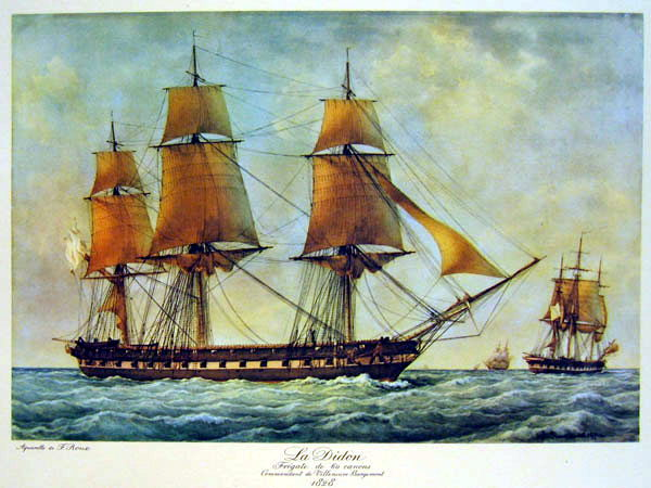 Frigate Didon